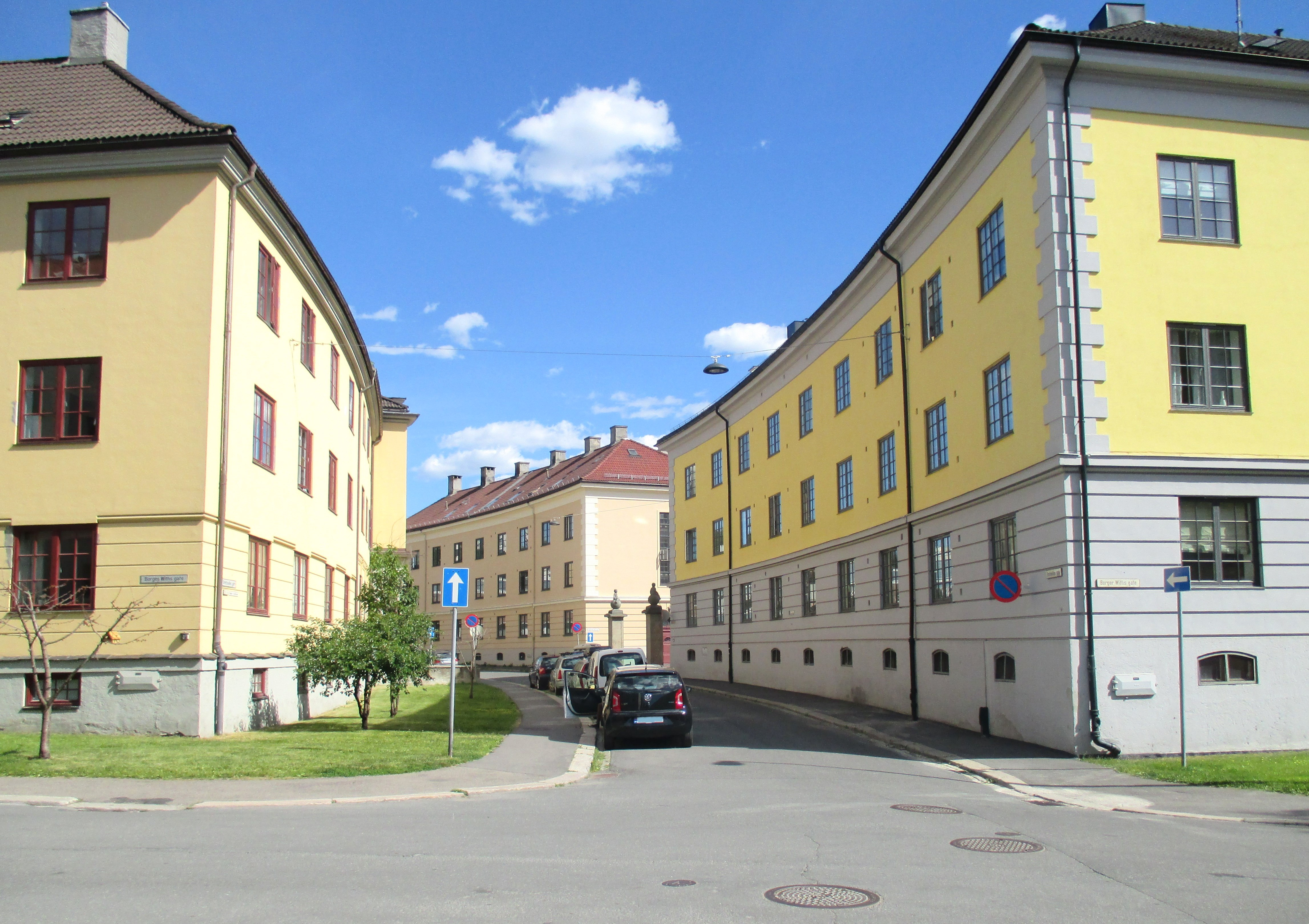 Brettevilles gate ved krysset med Borger Withs gate